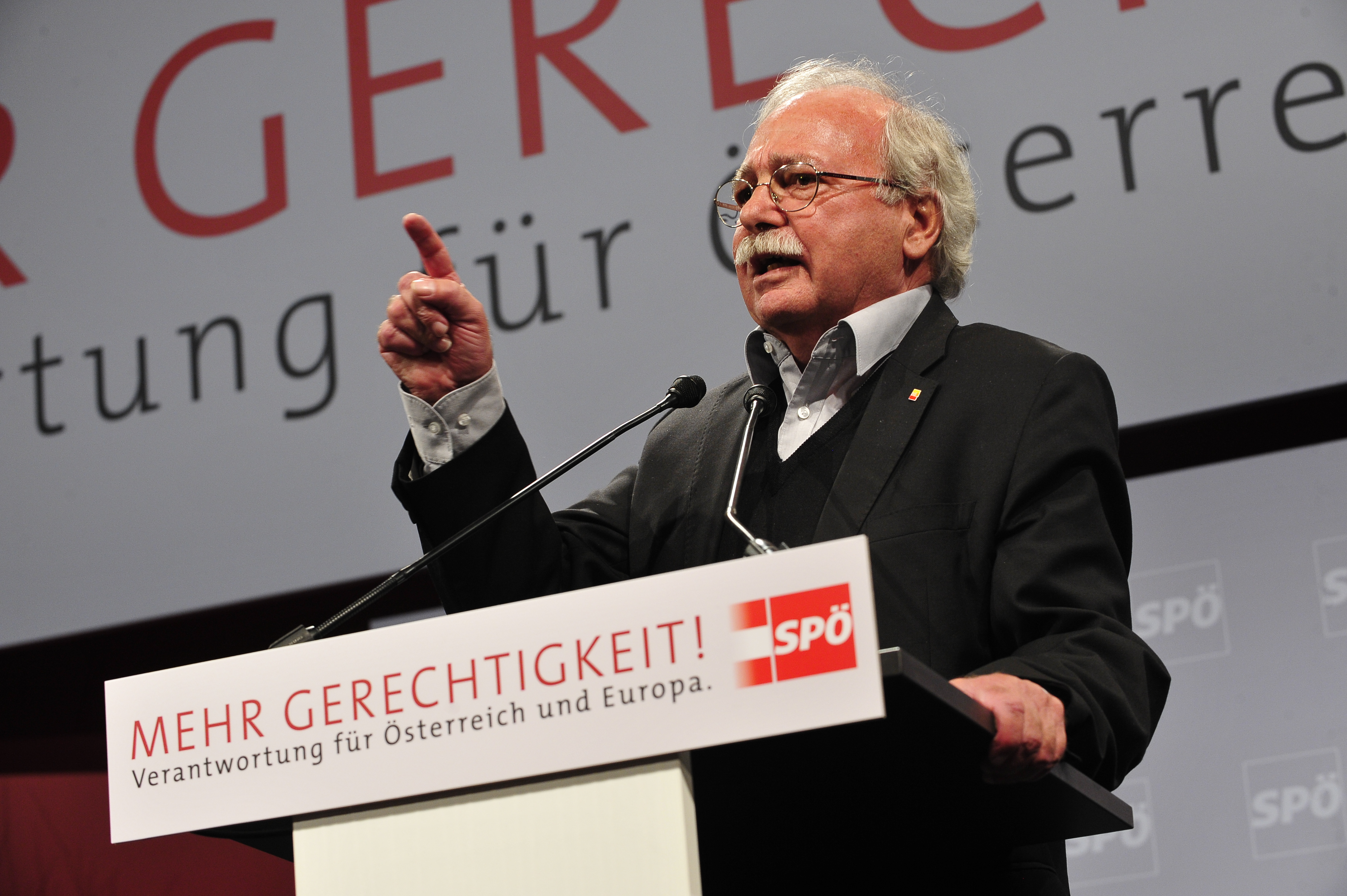 Josef Ackerl am SPÖ-Bundesparteitag 2012. 13.10.2012 - VAZ St.Pölten